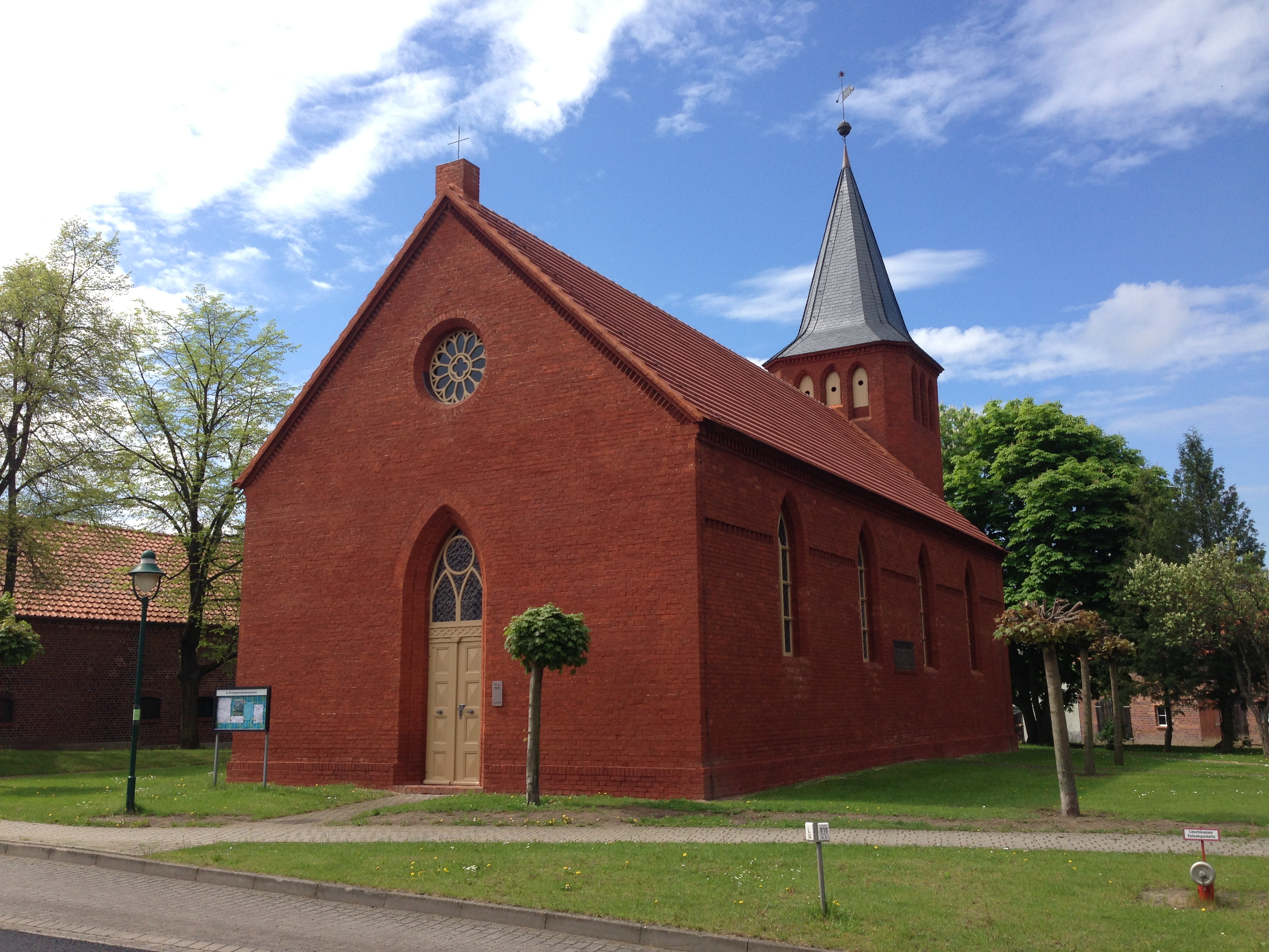 Schinkelkirche in Kleinwusterwitz nach Fassadensanierung 2012, Ansicht von Osten mit Rosettenfenster